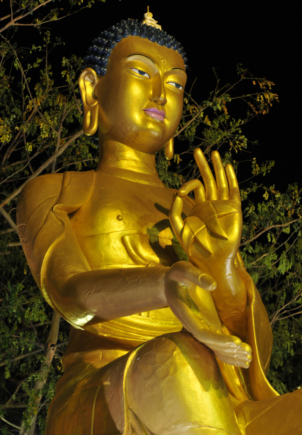 Vesak Day